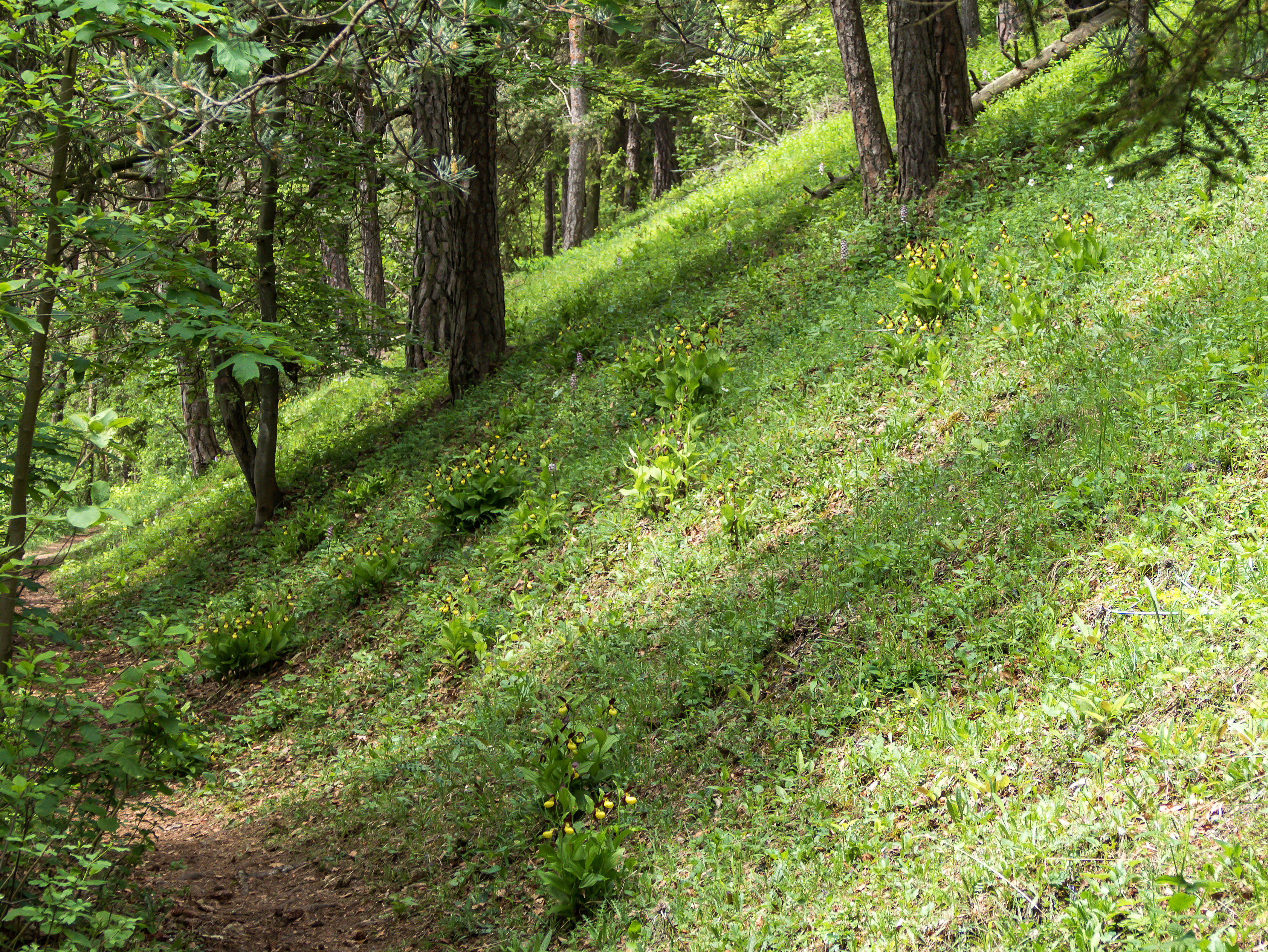 FFH-Gebiet 5233-303 Muschelkalkhänge um Teichel und Großkochberg DE-TH 3, Gelb-Frauenschuh (Cypripedium calceolus) ; dieses Gebiet wird geprägt durch steile Taleinschnitte stark zergliederte, vorwiegend südexponierte ausgedehnte Muschelkalk-Steilhänge auf Rötsockel mit Kalk-Trockenrasen, Kalkfelsen u. -schutthalden, Nadelholzforsten und kleineren Laubmischwäldern